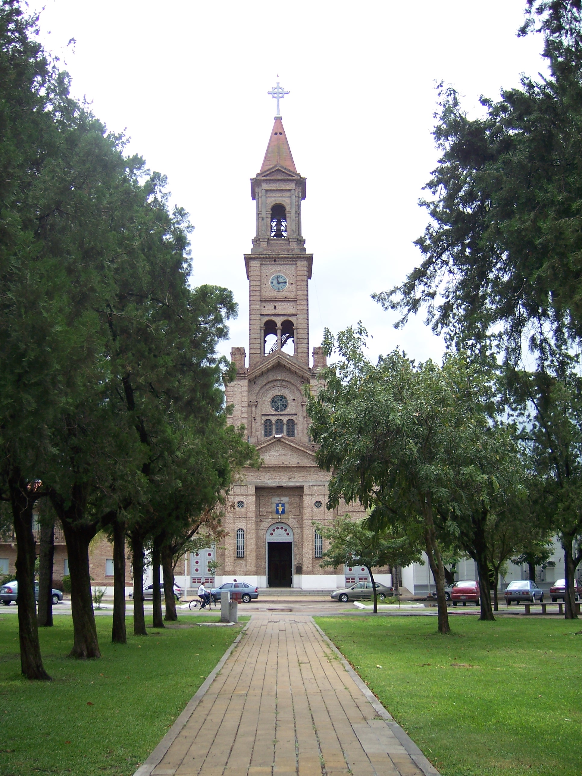 Cathedral de Reconquista (Santa Fe)